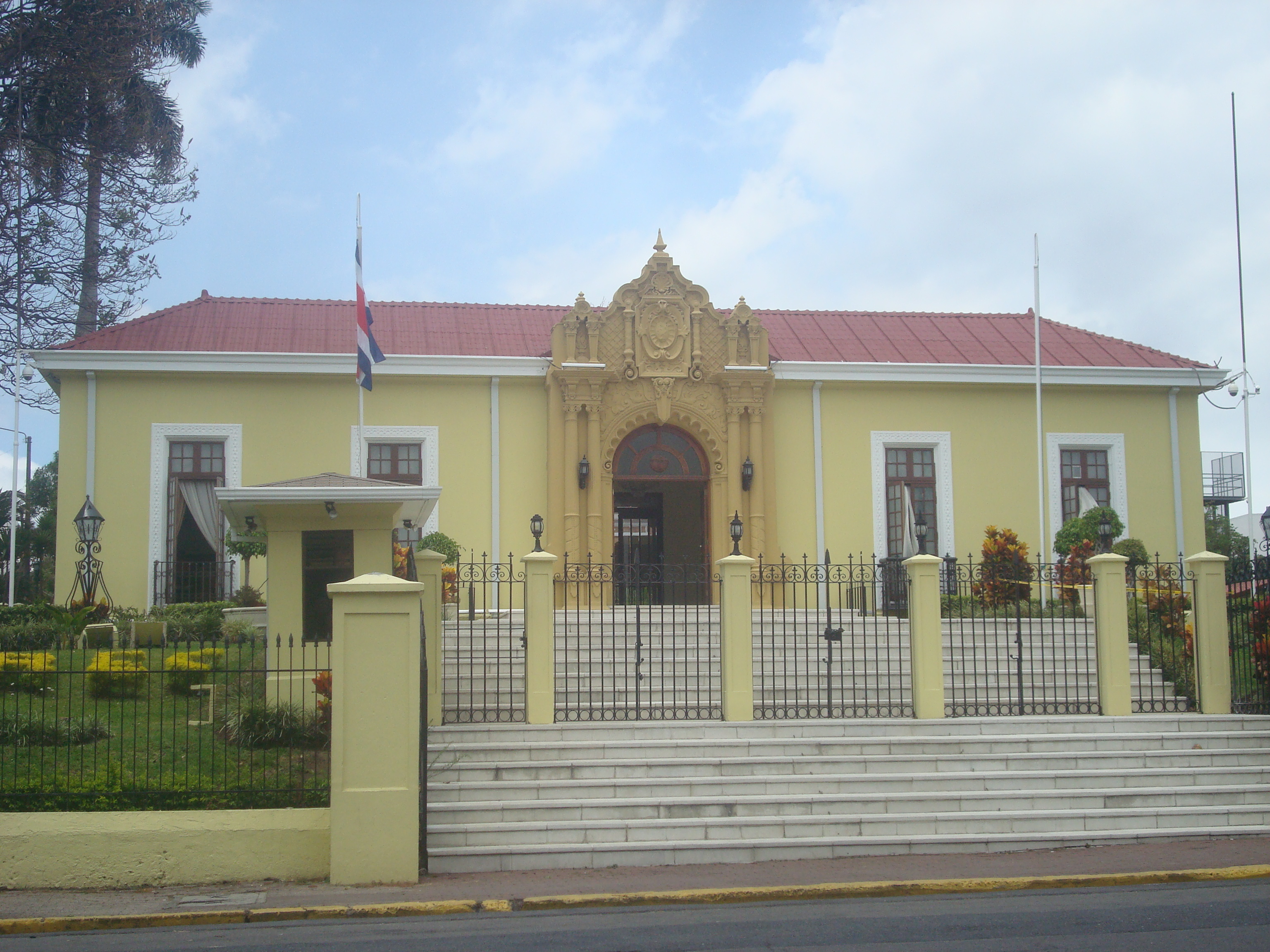 El Palacio de la Paz, también conocido como la Casa Amarilla, construido a principios del siglo XX y de estilo neocolonial, es la sede del Ministerio de Relaciones Exteriores de Costa Rica.